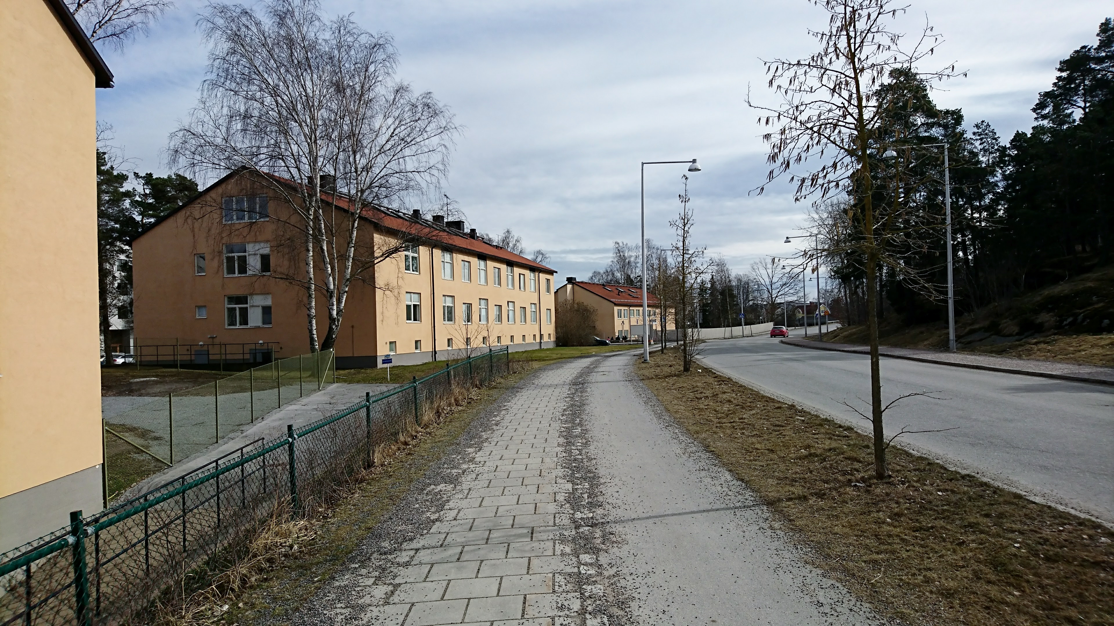 Byggnader i Järvastaden. Före detta militär kaserner tillhörande Första intendenturkompaniet (Int 1) åren 1944–1949 och senare Infanteriets kadettskola (InfKAS) åren 1949–1961. Artilleri och ingenjörofficersskolan (1964–1970) och Värnpliktsverket åren 1968–1994.